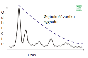 Przetłumaczona rycina przedstawiająca badanie ultrasonograficzne w trybie prezentacji A